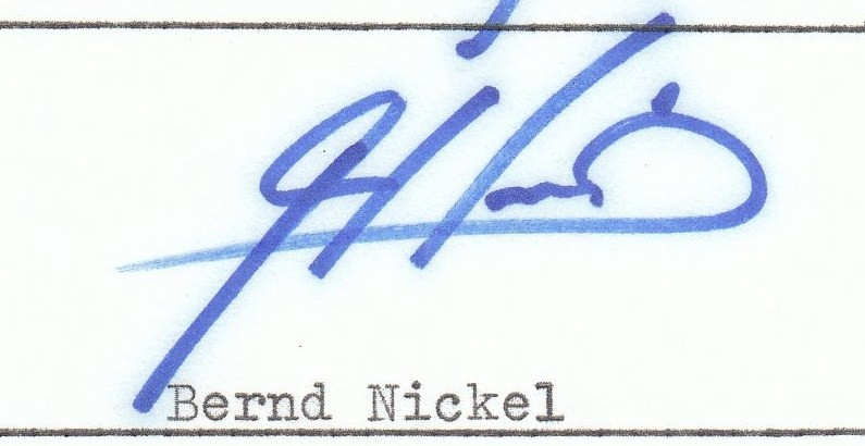 Autogramm von Bernd Nickel